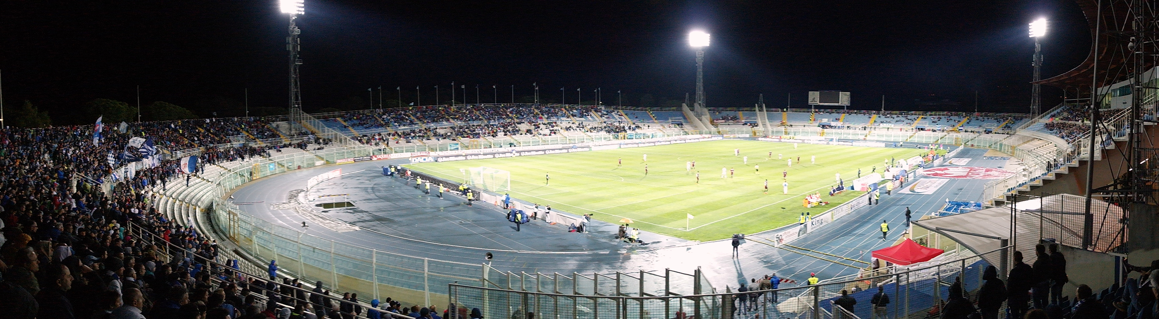 Panorama dello Stadio Adriatico di Pescara